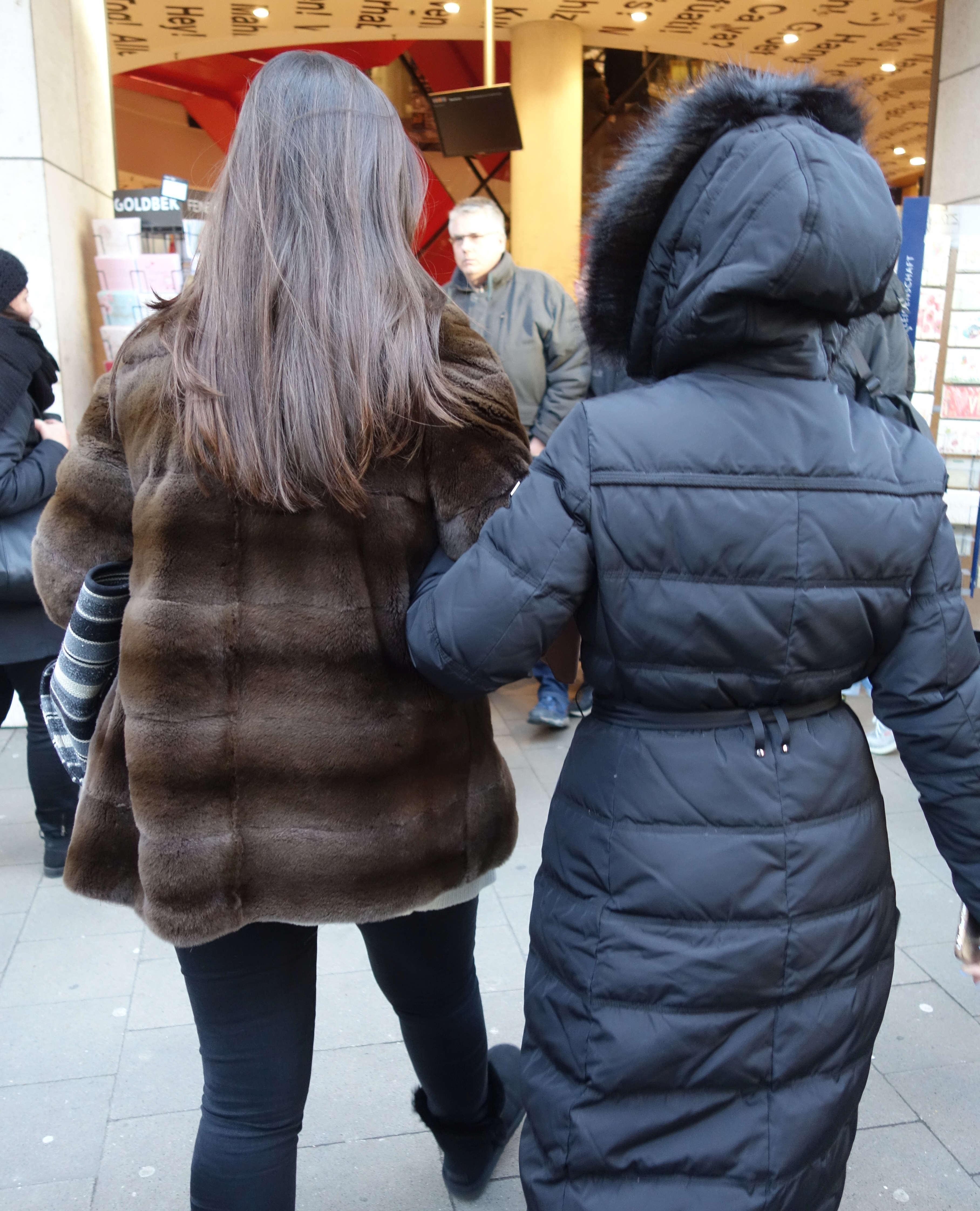 Samtnerzjacke und Steppmantel mit fuchsverbrämter Kapuze, Düsseldorf, Königsallee Januar 2019.